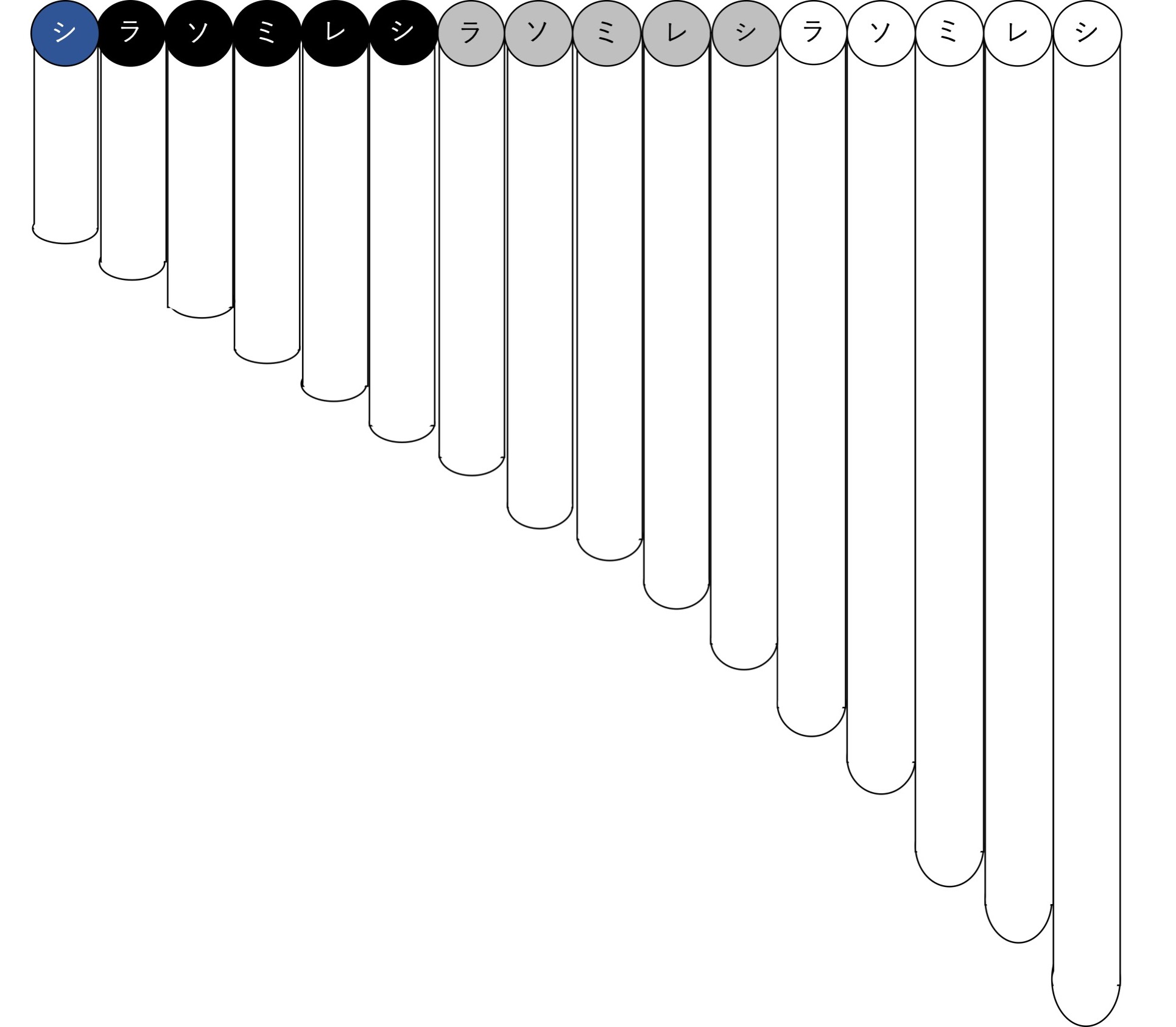 アンタラ配列